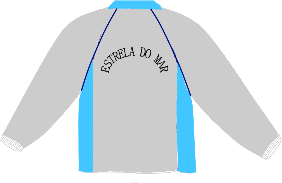 Estrela Do Mar School Uniform